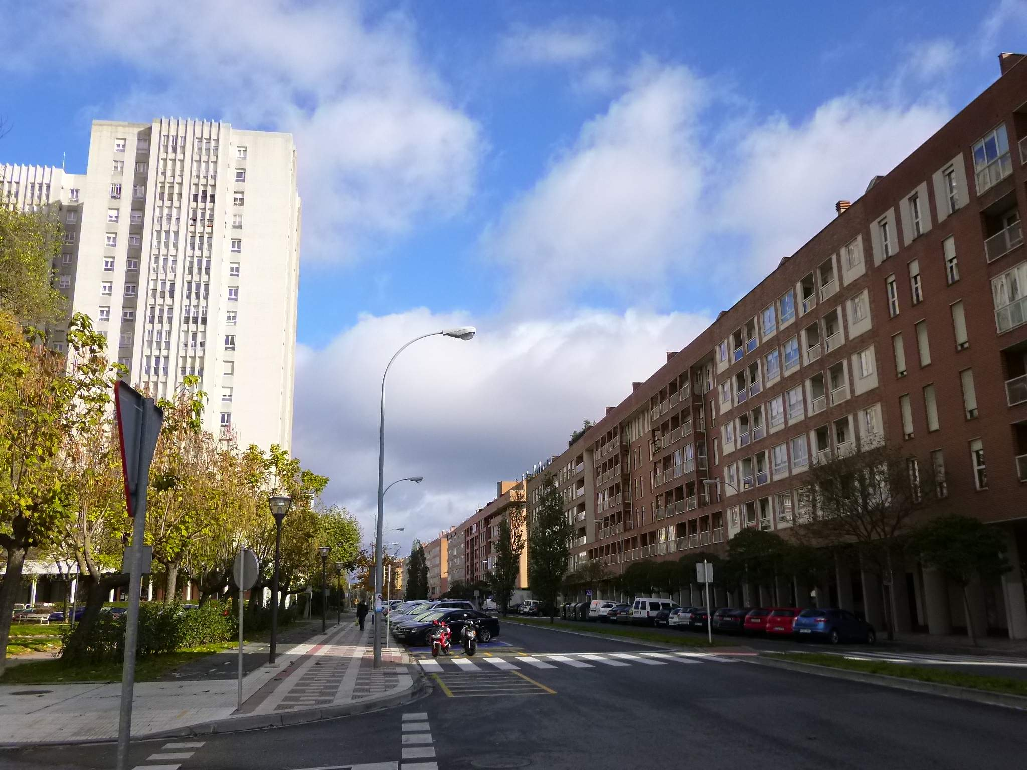 Paisaje urbano de Barañain (Navarra)